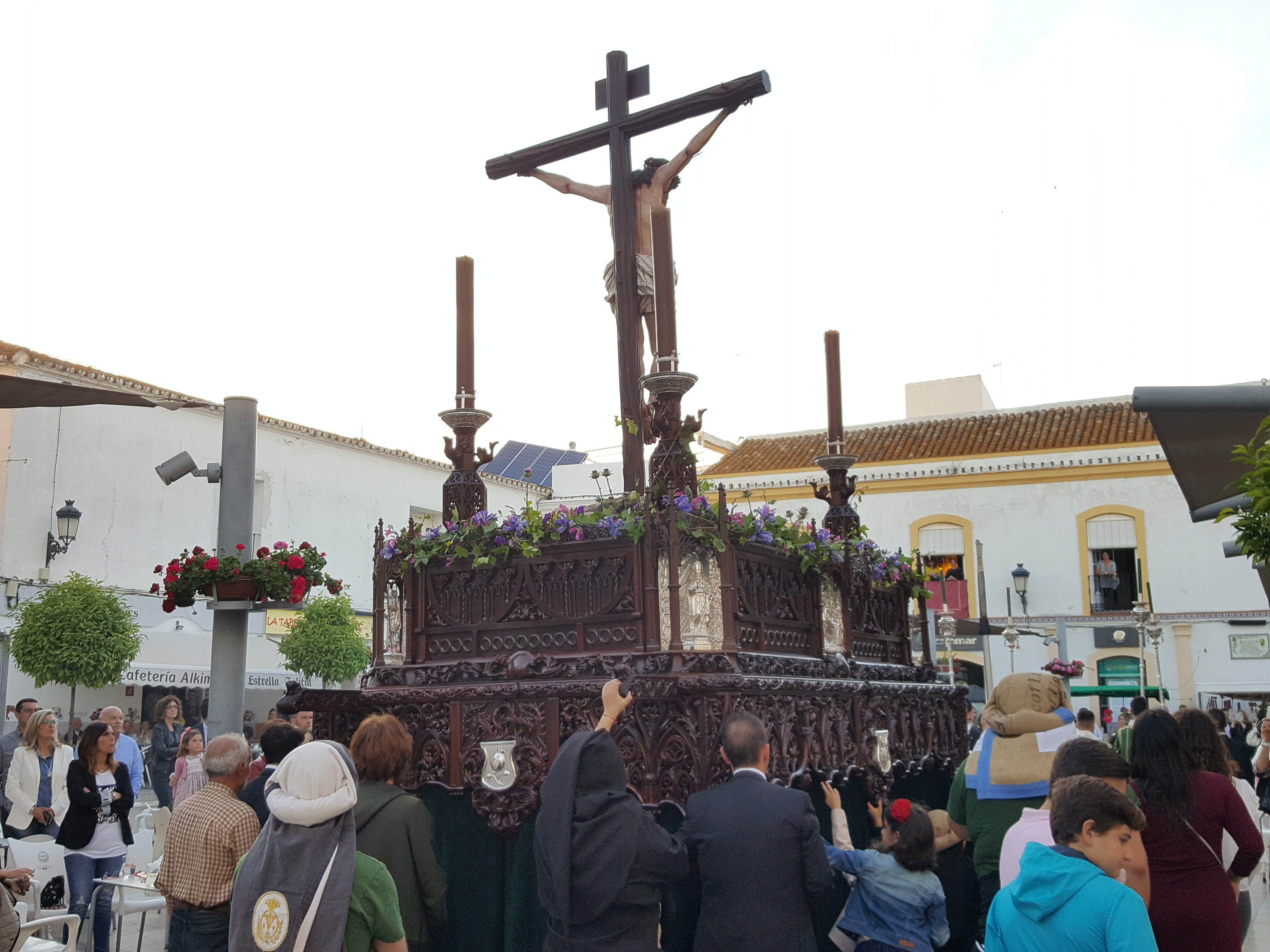 Hermandad del Cristo de la Vera-Cruz. Desfile procesional del Viernes Santo tarde. Vista de paso del Cristo de la Vera-Cruz por el casco urbano de Moguer